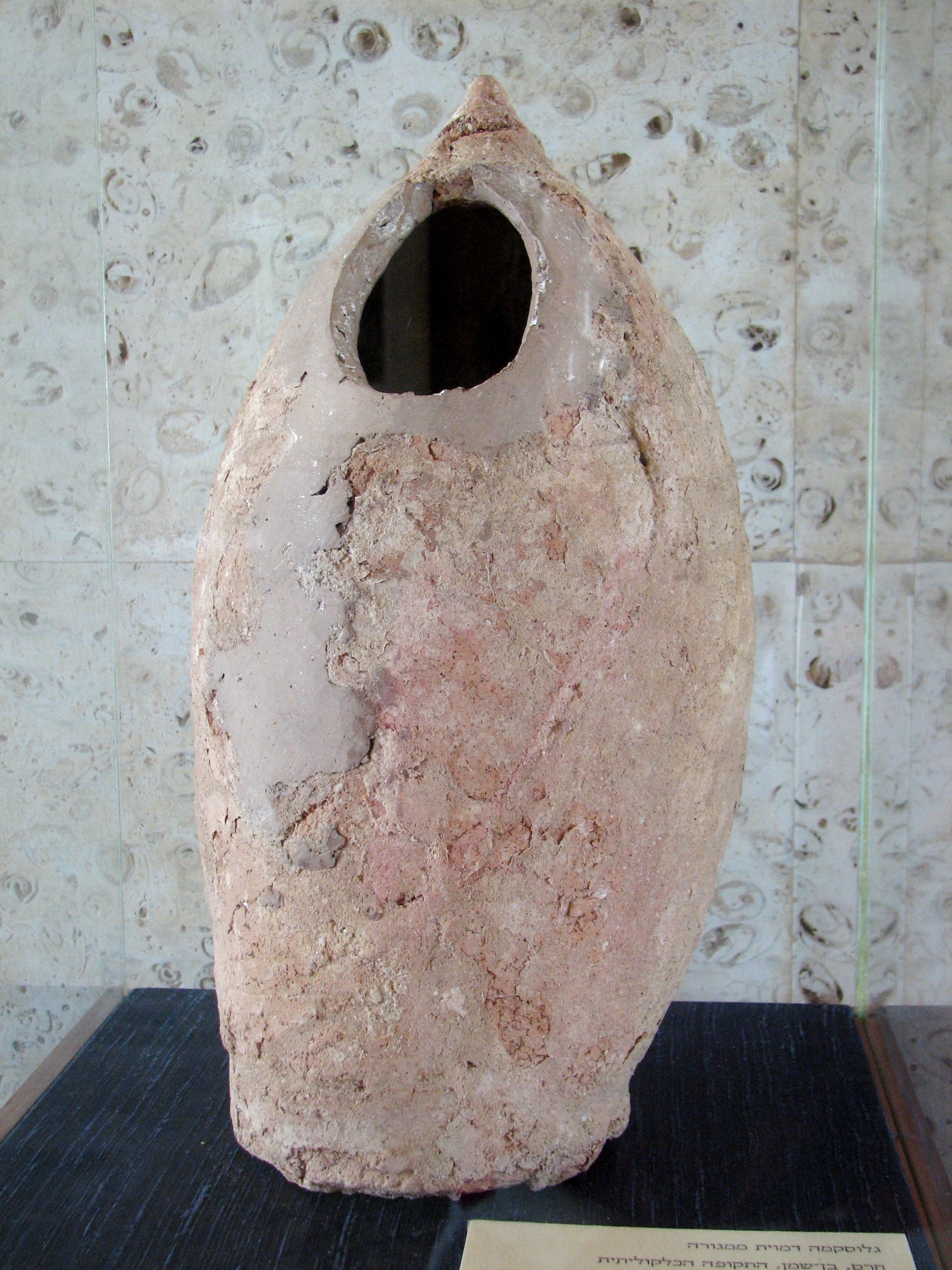 Dagon Museum, Downtown, Haifa, Israel The Museum is dedicated to the history of grain products מוזיאון דגון בעיר התחתית בחיפה שוכן במבנה המשרדים של ממגורות דגון. המוזיאון מוקדש לתולדות הדגן ומוצריו, וכלל ממצאים ארכאולוגים הקשורים בנושא וכן דגמים של מתקנים שונים בהם משתמשים בממגורות דגון גלוסקמא דמוית ממגורה מהתקופה הכלקוליתית מבן שמן